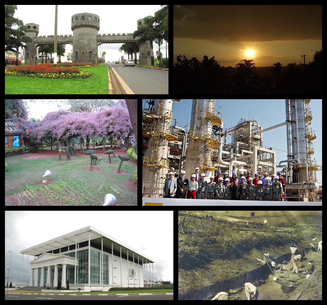 Composição artística de Paulínia